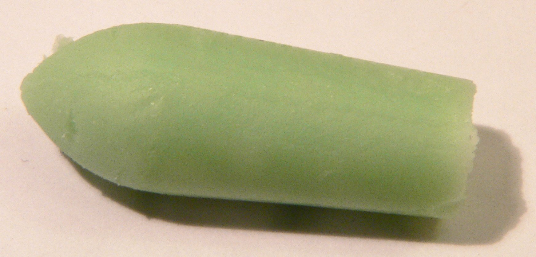 Eucalyptol suppositories